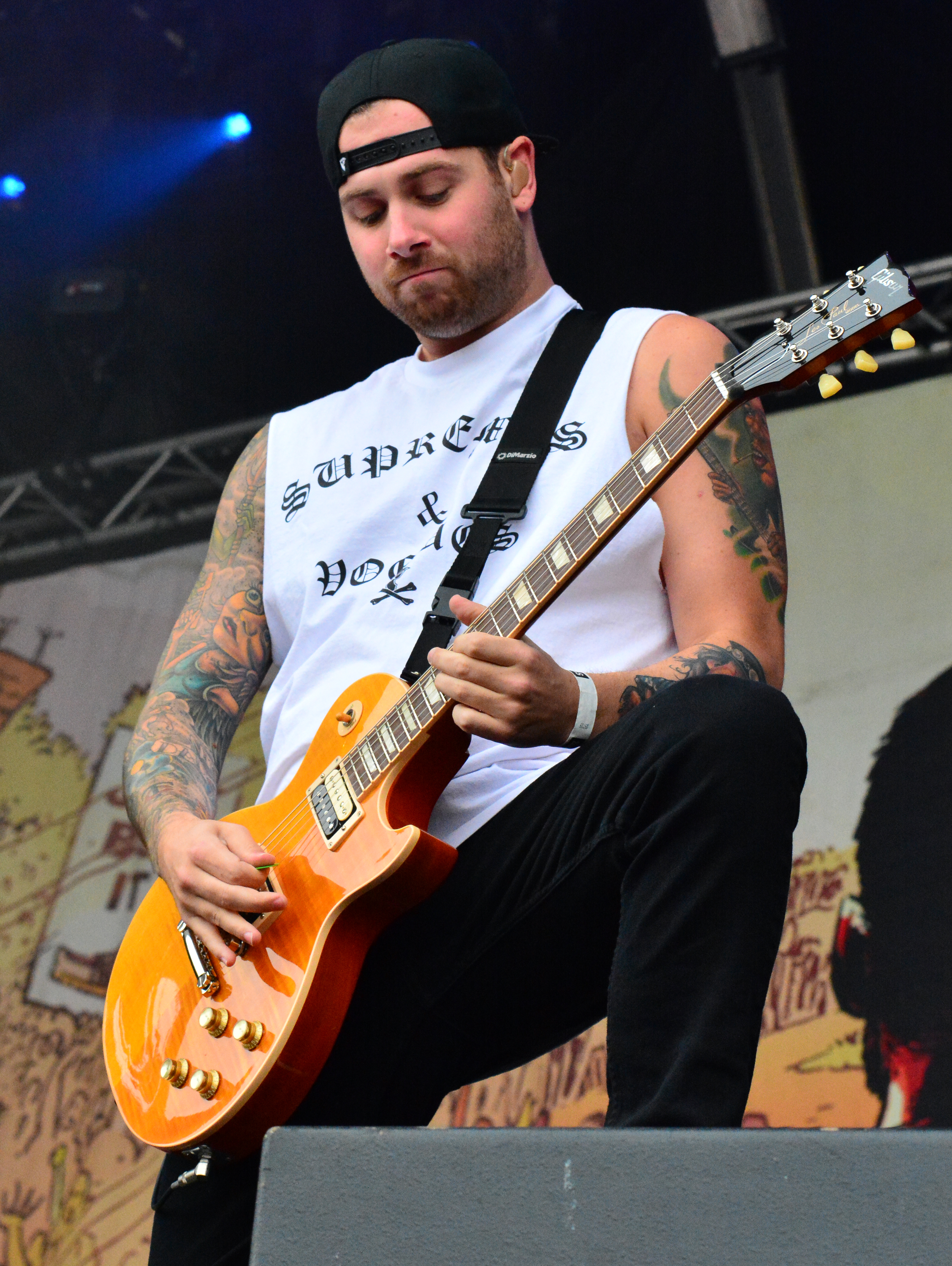 Kevin Skaff von A Day to Remember beim Elbriot 2014